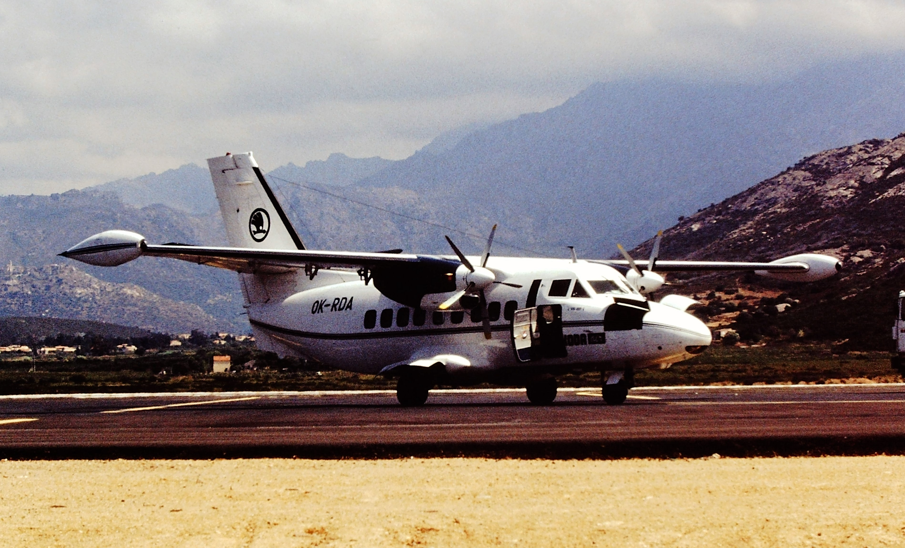 OK-RDA Let 410 Skoda Air Calvi Airport 08-1992